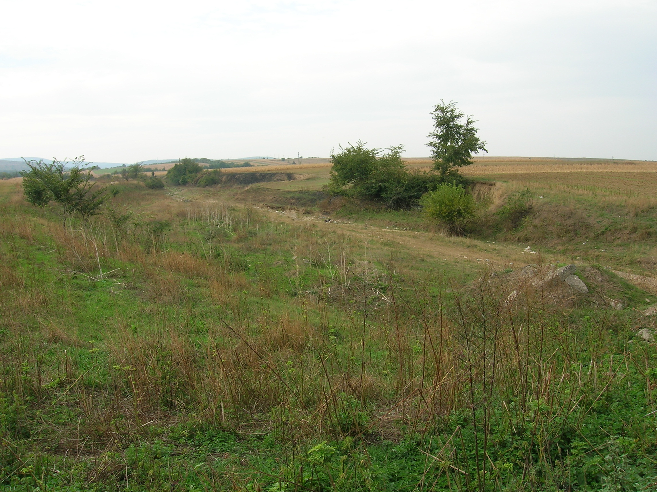 Comuna Valea Seacă Bacău - Satul Mândrişca - valea Văii Seci lângă DN2